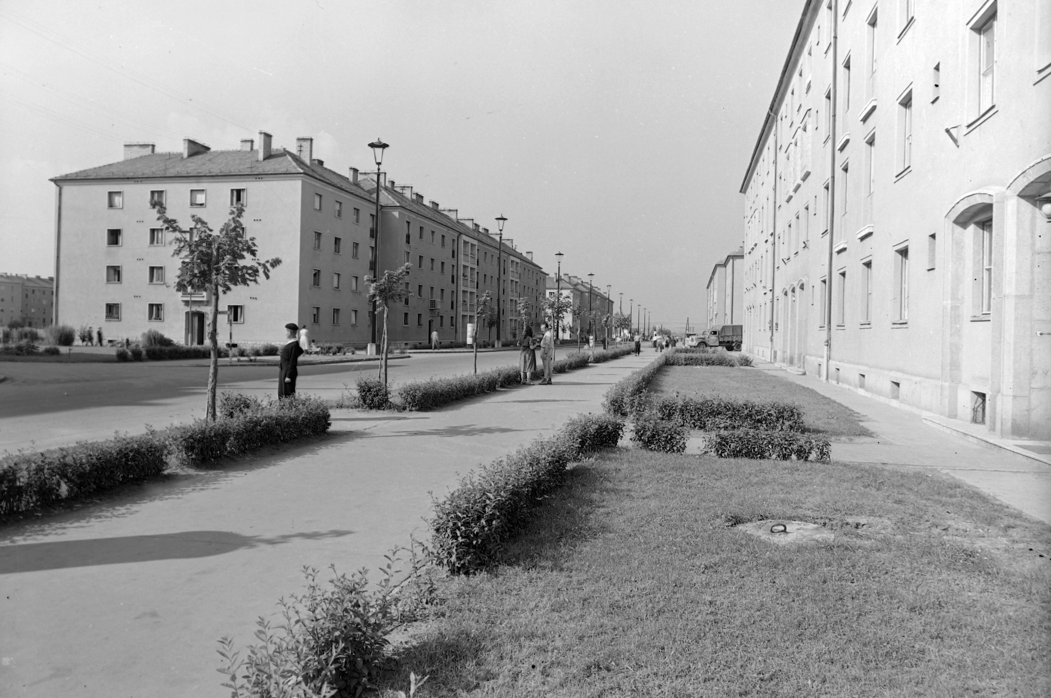 Egressy Béni (Lenin) út a Munkácsy tér felől nézve, jobboldalt a 28. szám bejárata, baloldalt a növekvő páratlan számok. Location: Hungary Tags: street view, lamp post Title: Egressy Béni (Lenin) út a Munkácsy tér felől nézve, jobboldalt a 28. szám bejárata, baloldalt a növekvő páratlan számok.